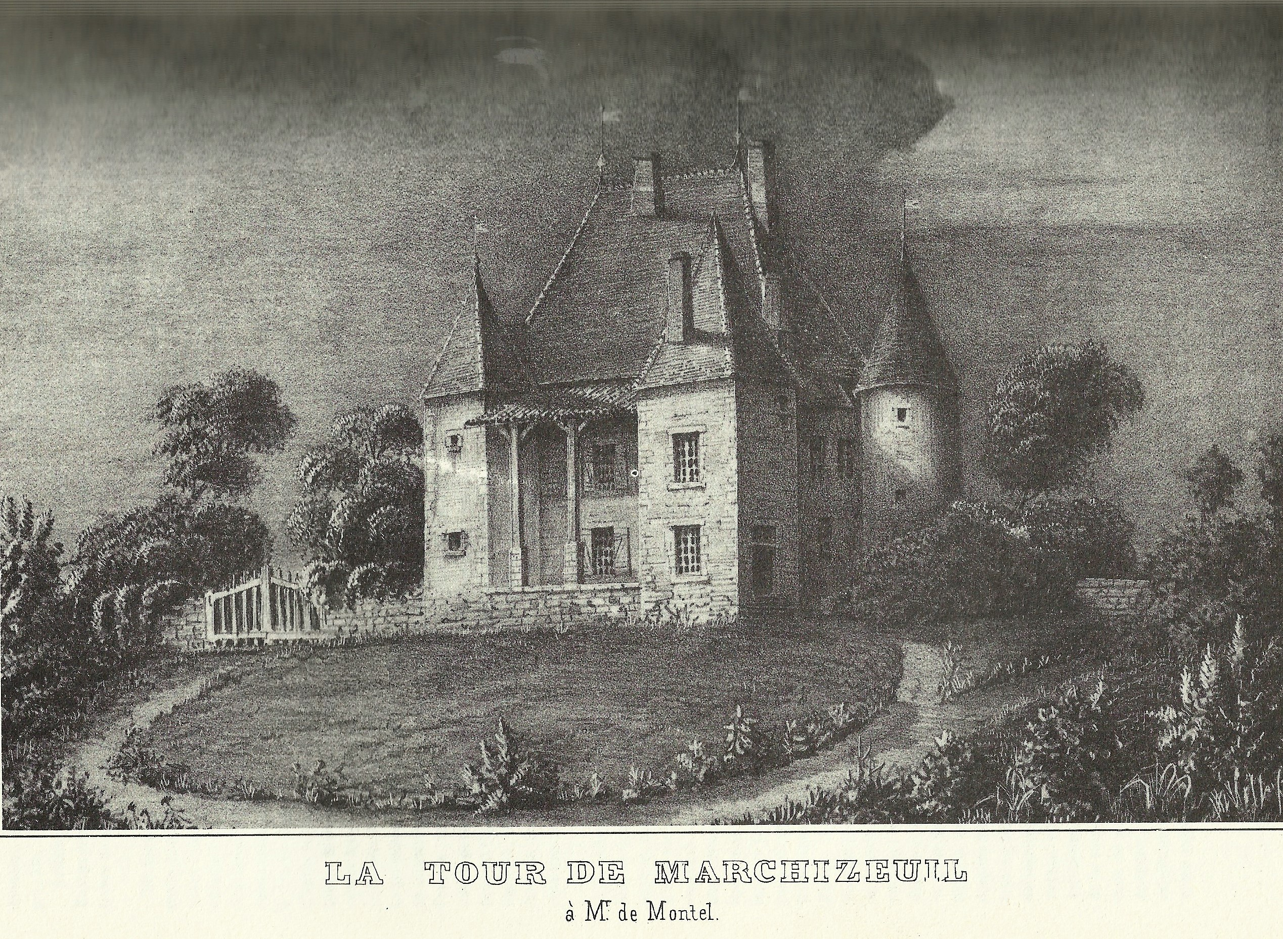 Le tour de Marchizeuil telle qu'elle était lorsqu'elle a été dessinée en 1841.